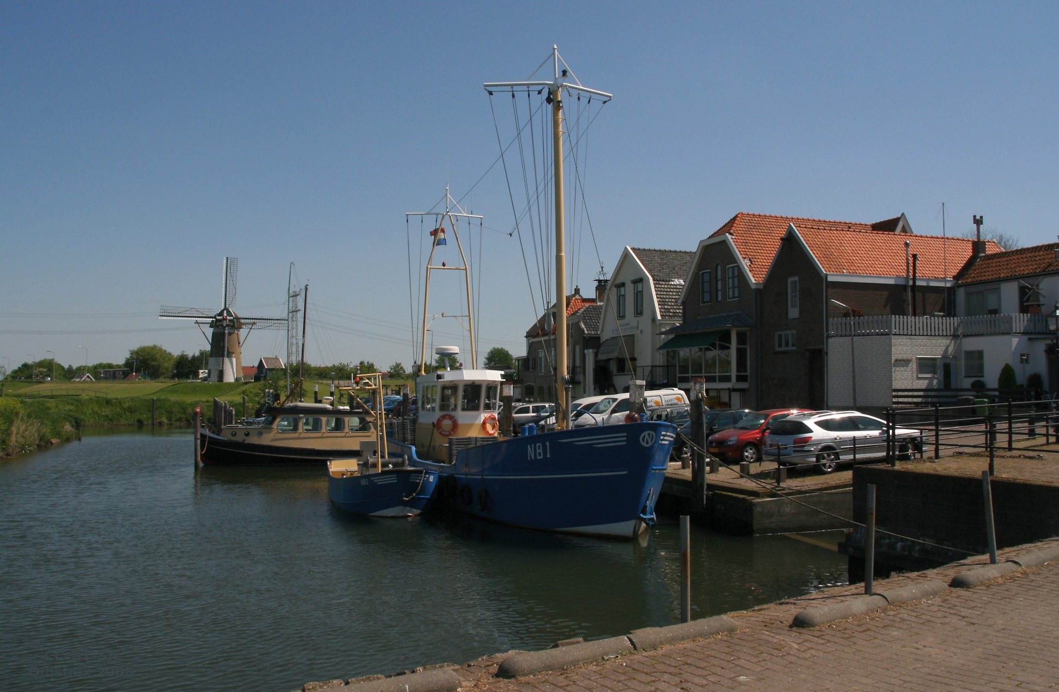 Nieuw-Beijerland: haven, met op de achtergrond molen De Swaen